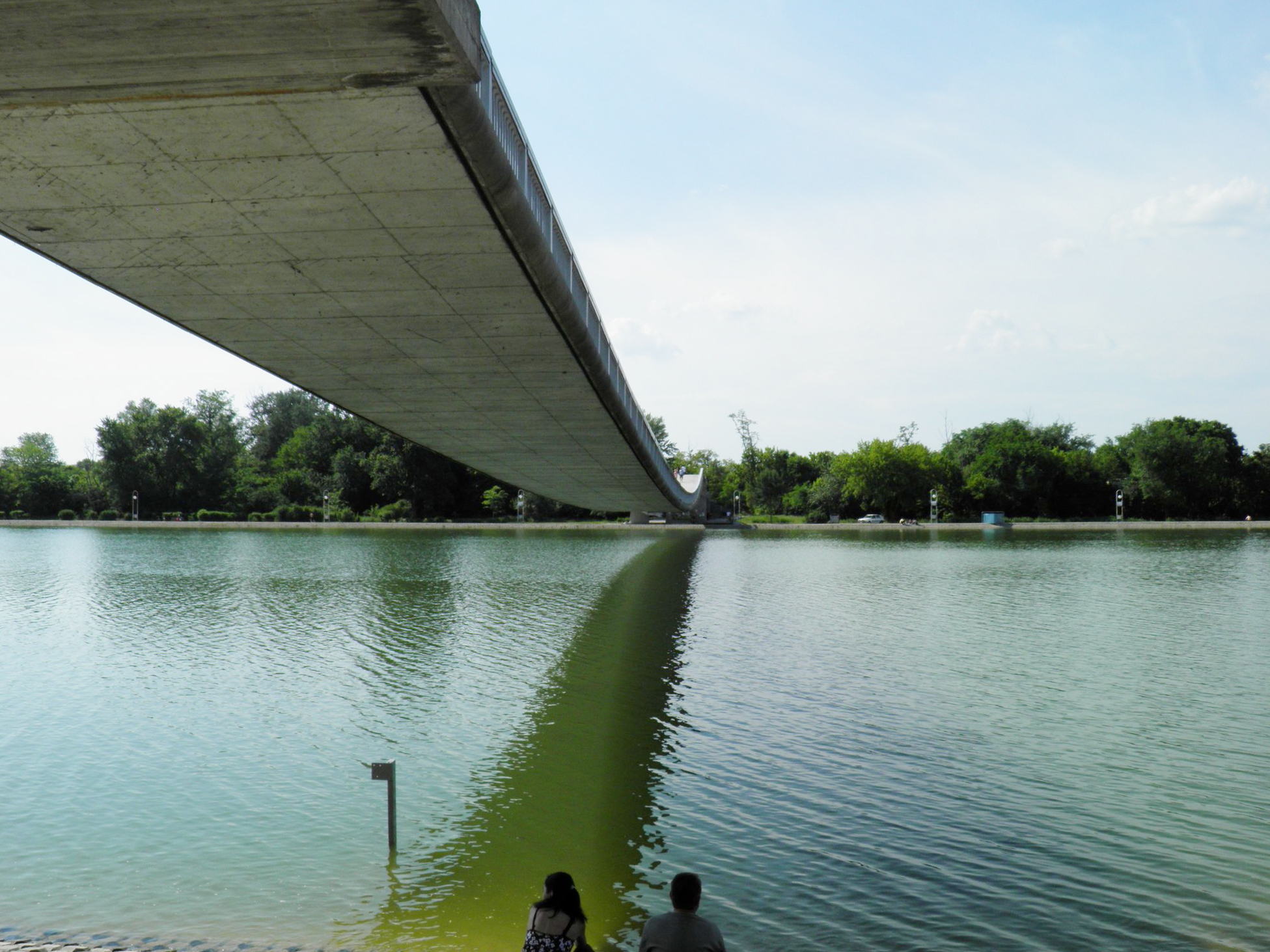 Моста на гребната, погледнат от долу